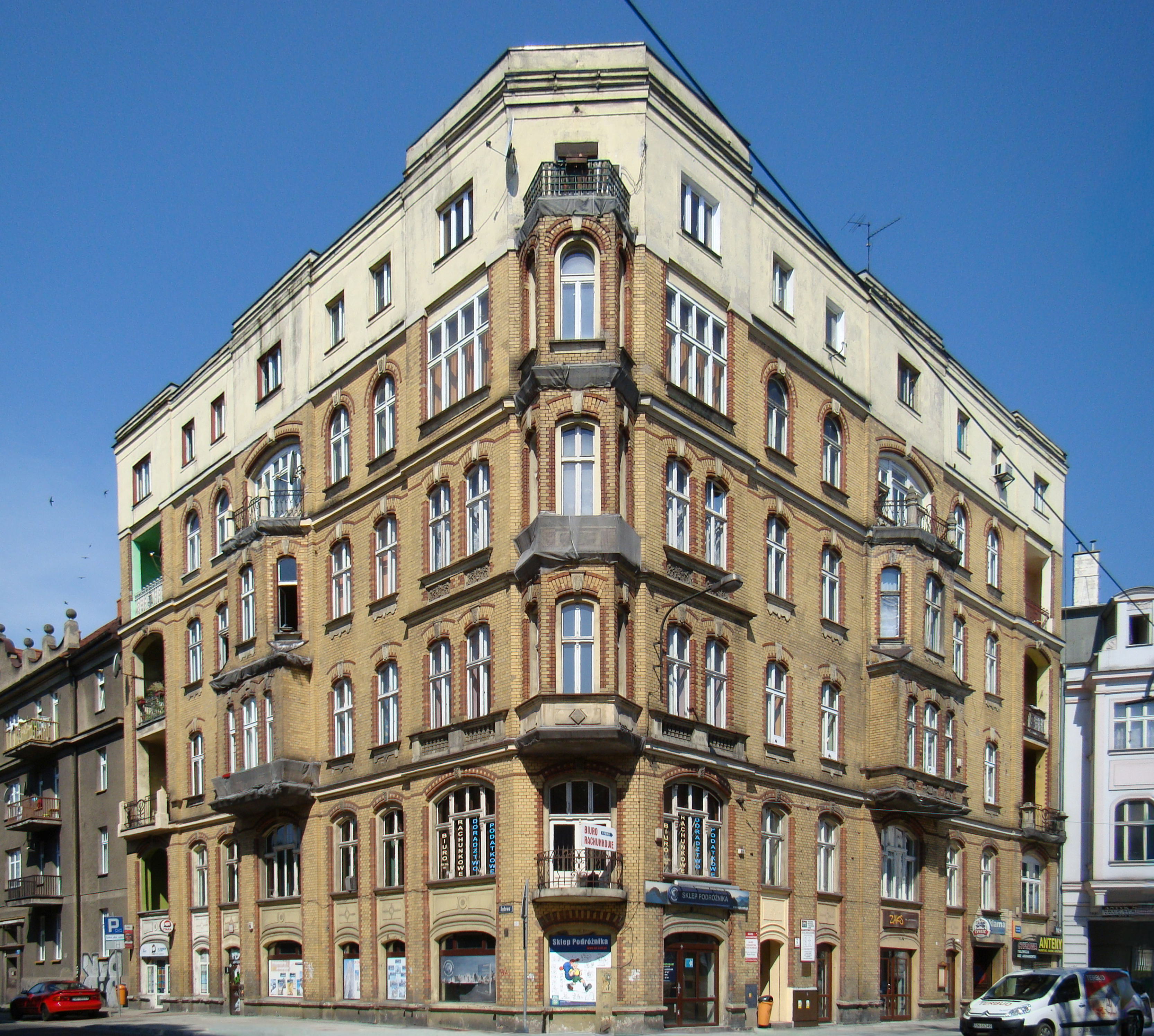 Katowice, kamienica, 1901